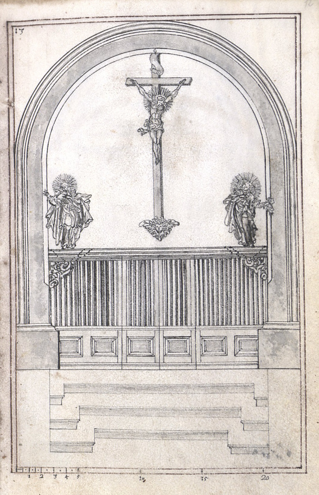 Architectura Capucinorum, Handschrift, 17. Jh., Württembergische Landesbibliothek, Cod. Don. 879, fol. 11v, Transversalbogen am Übergang zum Psallierchor mit Chorgitter und Kreuzigungsgruppe (nach Walther Hümmerich)